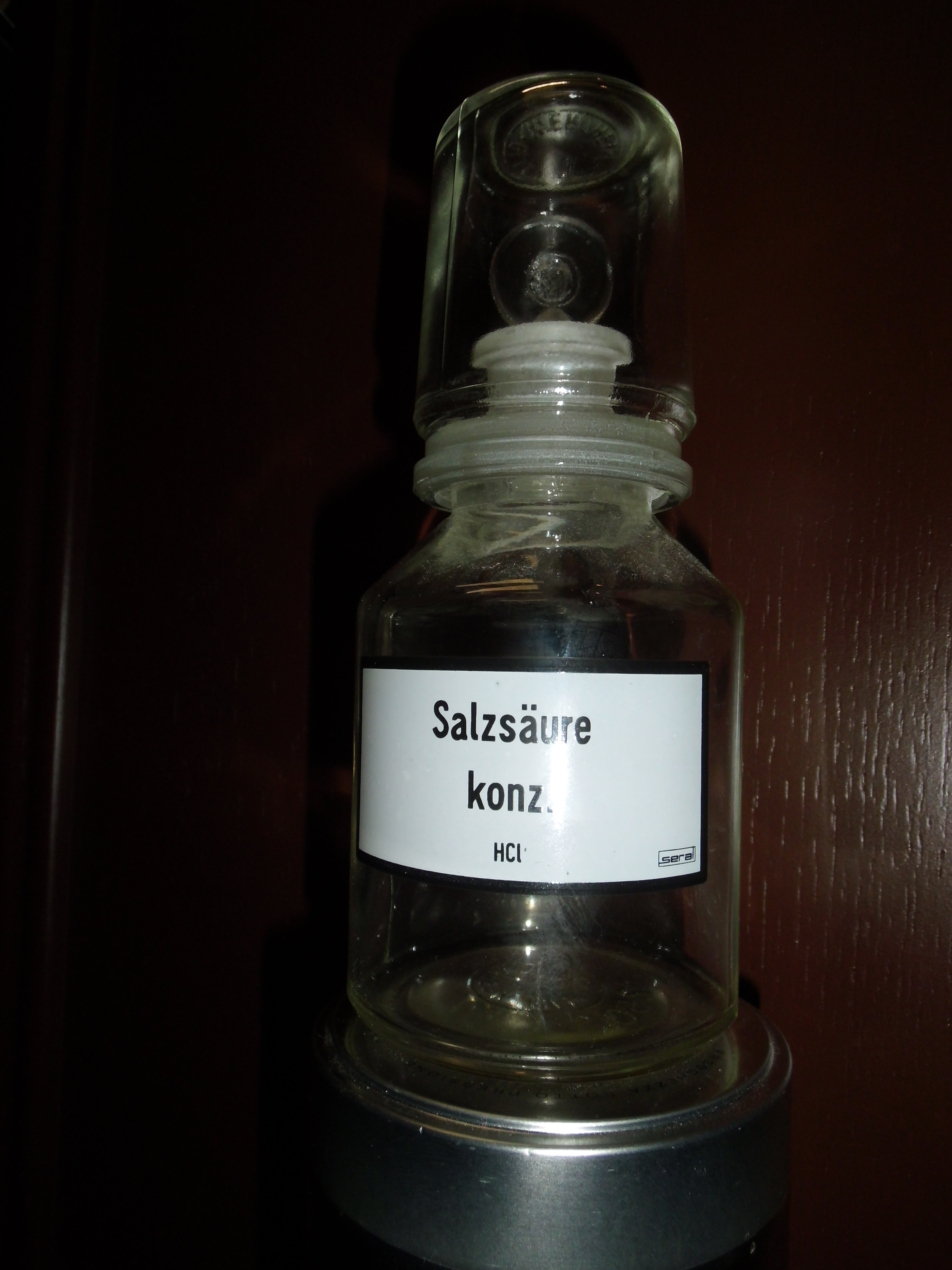 Photo einer Kappenflasche (Glasflasche für Salzsäure)